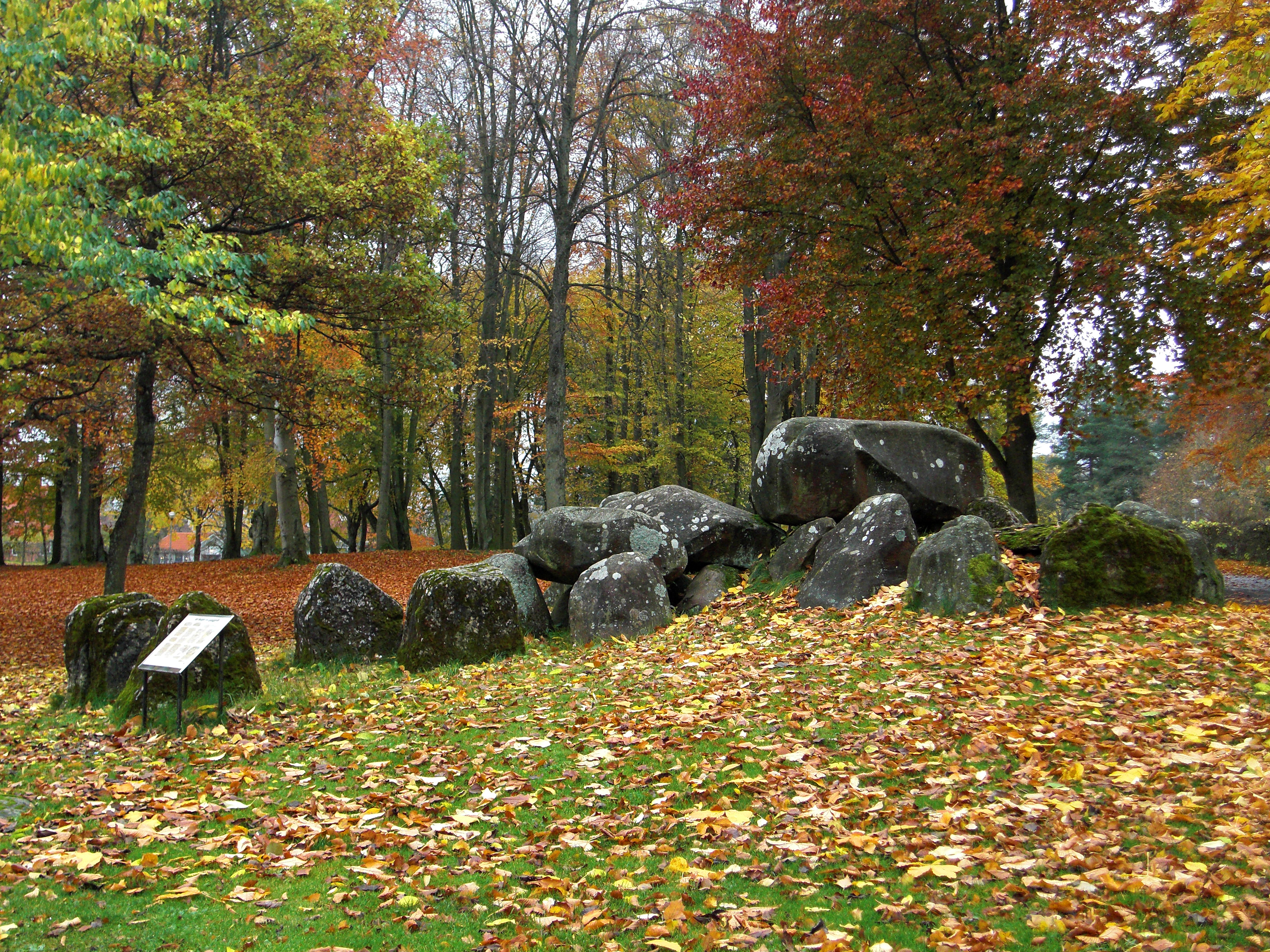 Den neolitiska gånggriften Kyrkerör (RAÄ-nr Falköping 28:1) i Planteringsförbundets park (Plantis), Falköping, Falköpings kommun, f.d. Skaraborgs län, Västergötland, Västra Götalands län, Sverige. I bakgrunden ses bland annat bokar.